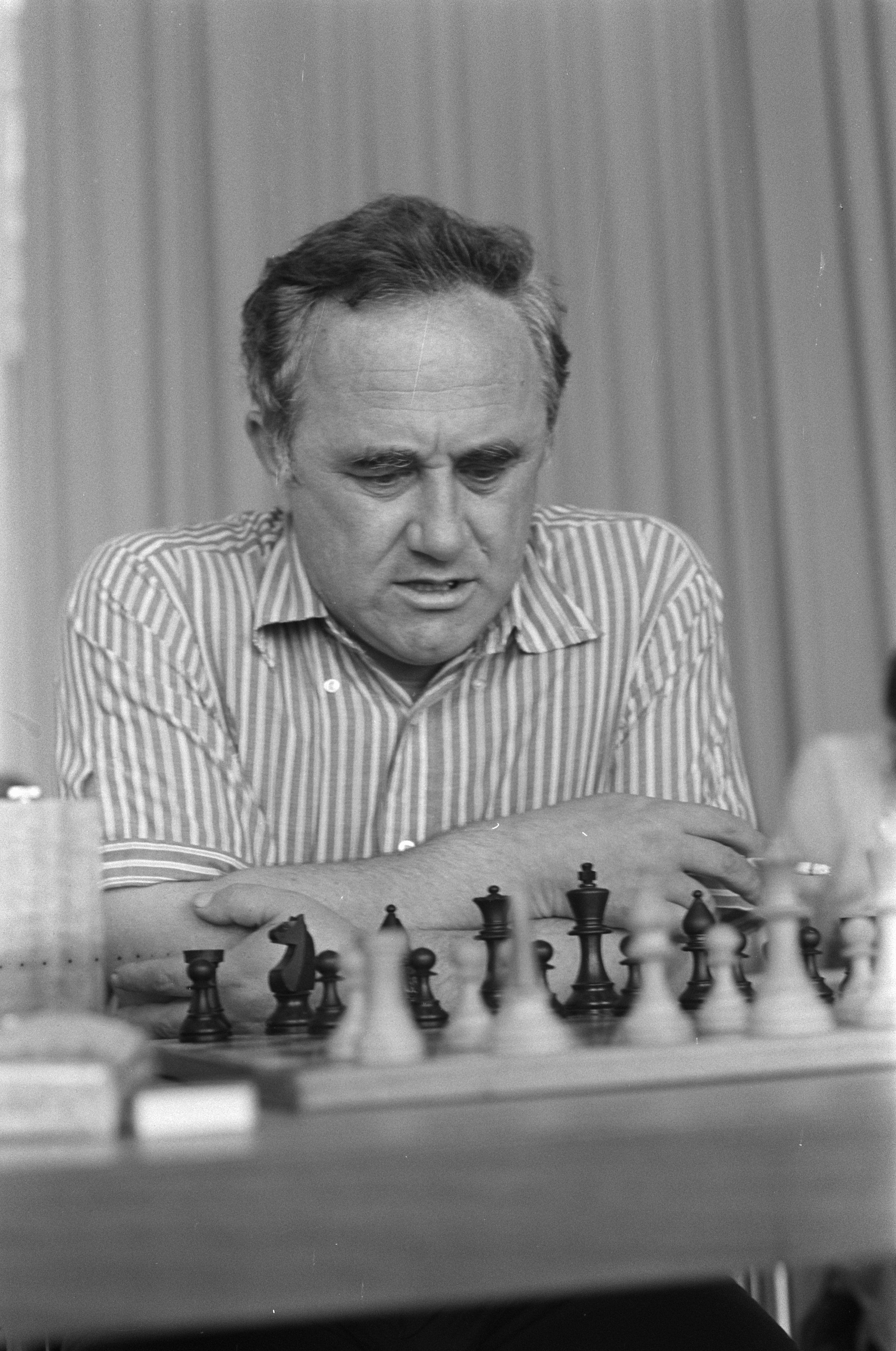 Collectie / Archief : Fotocollectie Anefo Reportage / Serie : [ onbekend ] Beschrijving : IBM-schaaktoernooi, 7e ronde; nr. 3, 4 Geller (kop), nr. 6 Ree staand bij Geller Datum : 23 juli 1974 Trefwoorden : schaken Instellingsnaam : IBM-Schaaktoernooi Fotograaf : Croes, Rob C. / Anefo Auteursrechthebbende : Nationaal Archief Materiaalsoort : Negatief (zwart/wit) Nummer archiefinventaris : bekijk toegang 2.24.01.05 Bestanddeelnummer : 927-3434